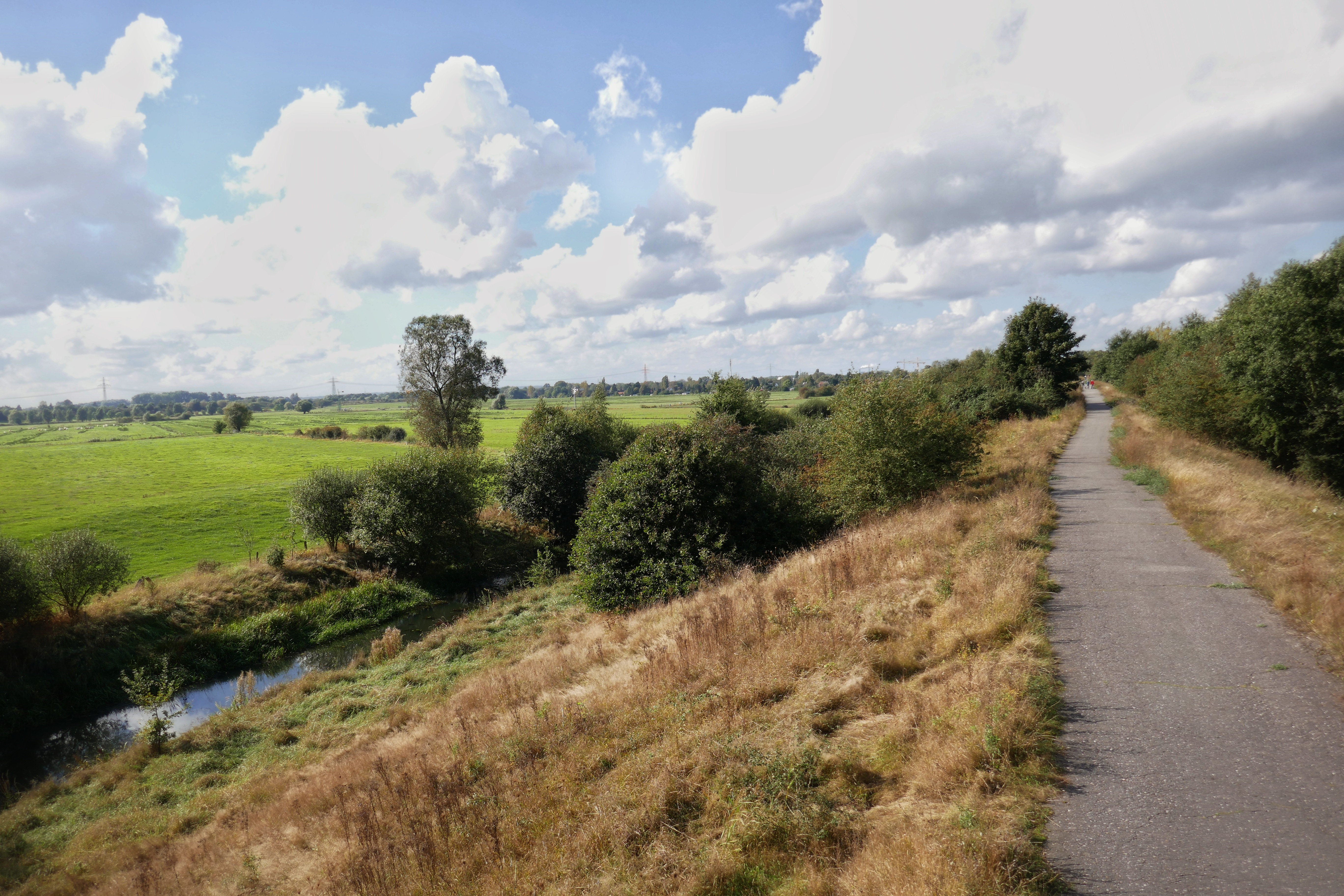 Östlicher Billwerder Bahndamm (Blick Richtung Westen, links im Bild die Allermöher Marsch)